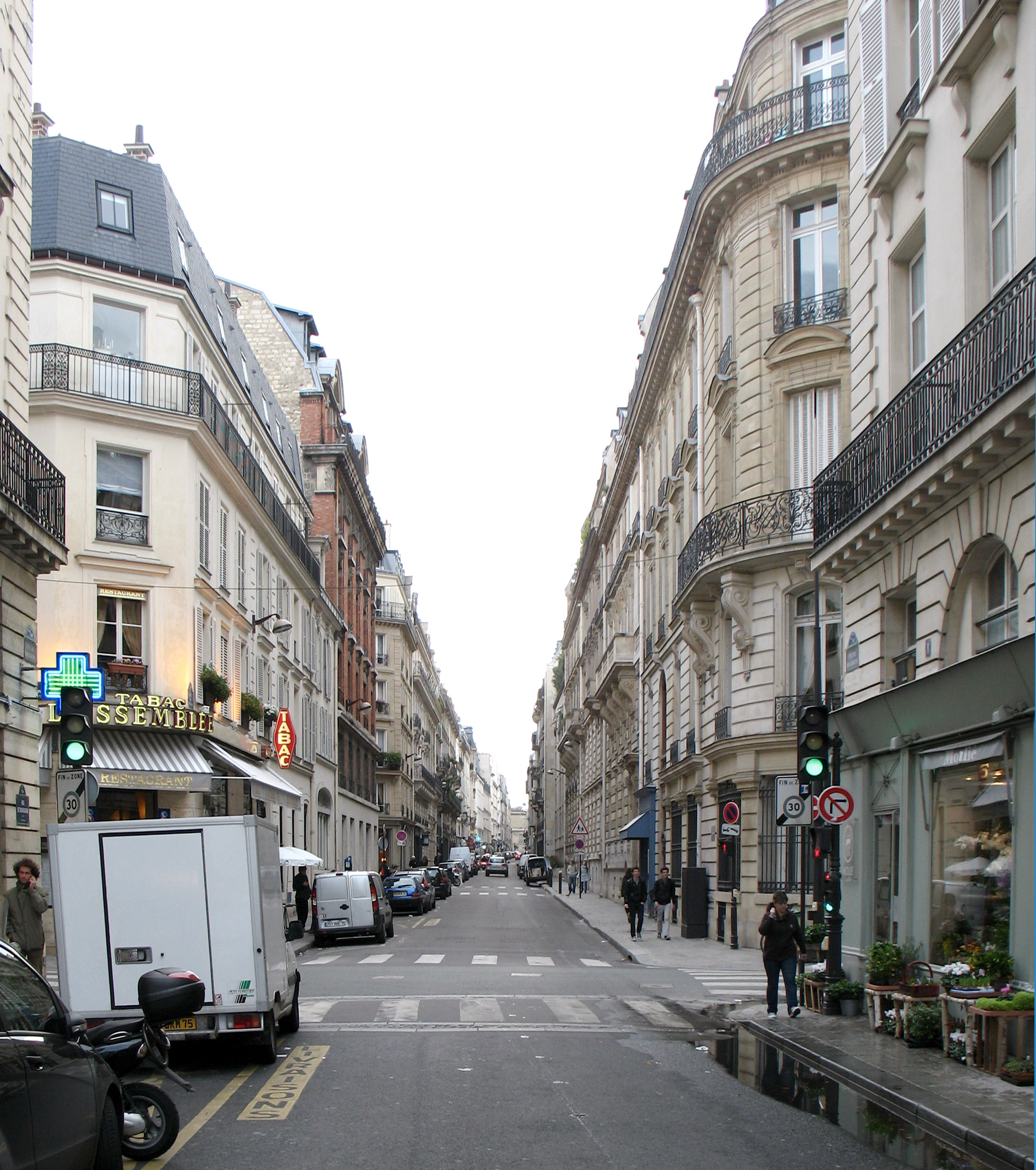 6, rue de Bourgogne, Paris 7e, au croisement de la rue Saint-Dominique